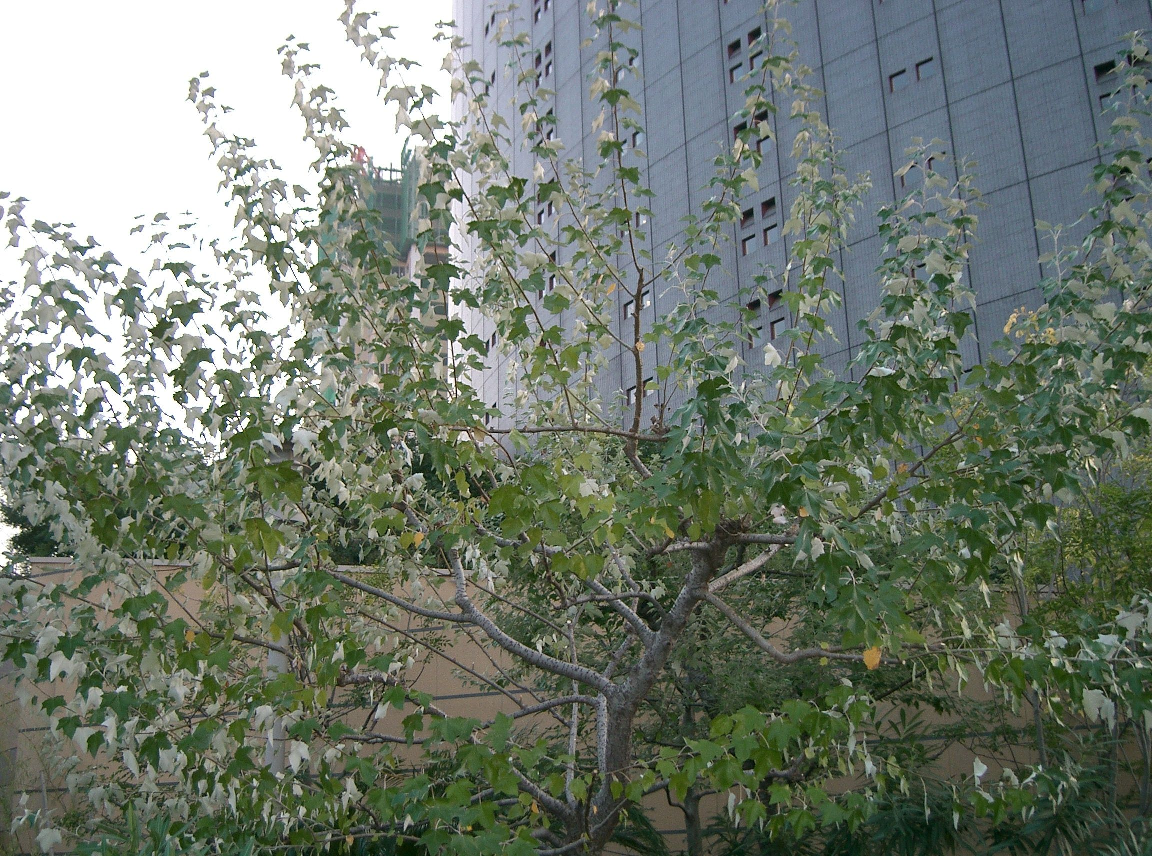 Populus alba